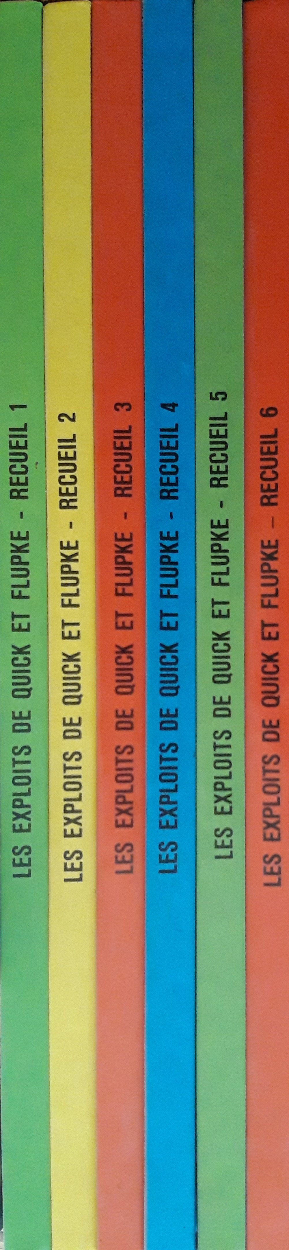 Quick et Flupke 1ère série.